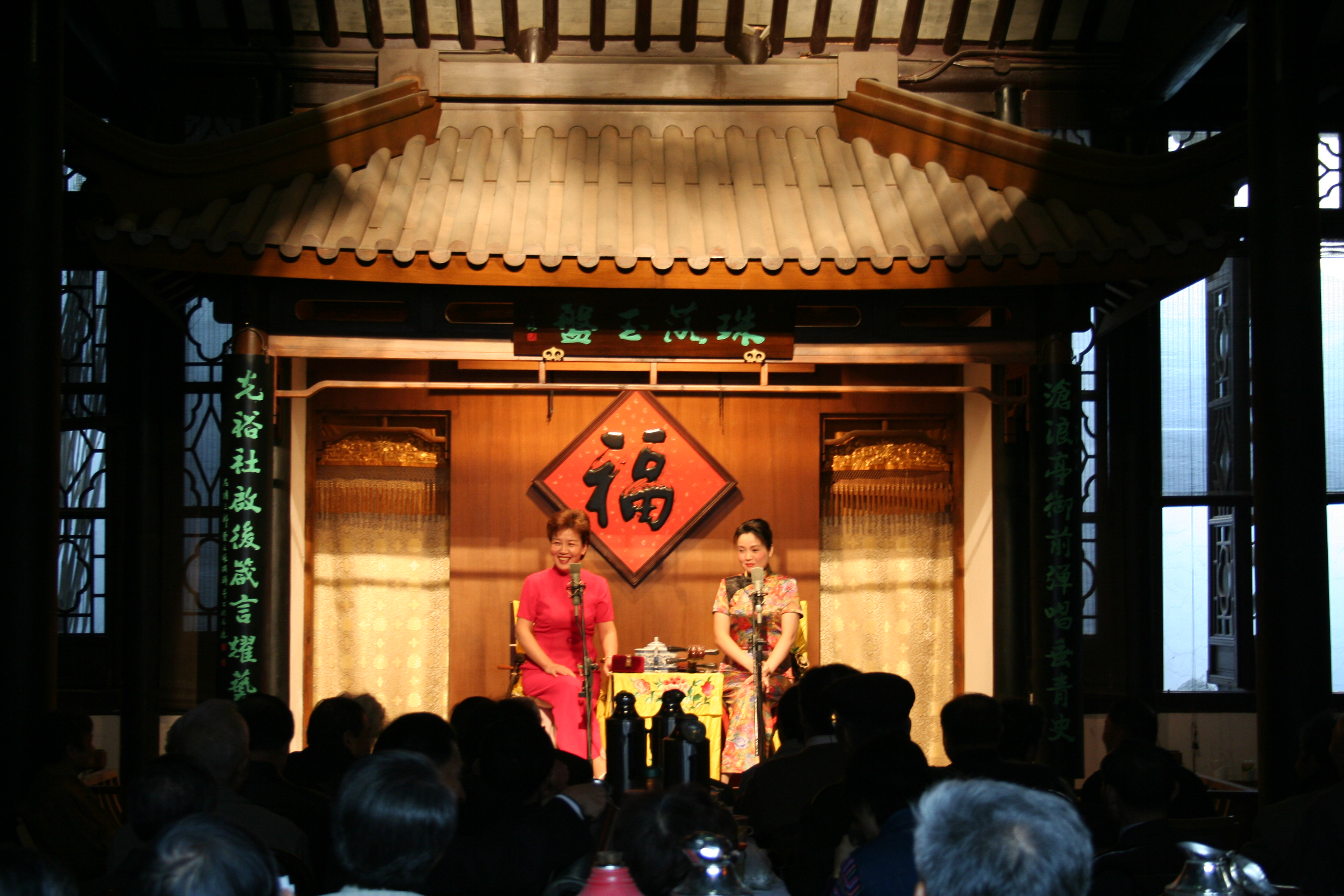 Suzhou Konqu Ex